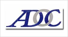 Dies ist das Logo der Unternehmens ADOC